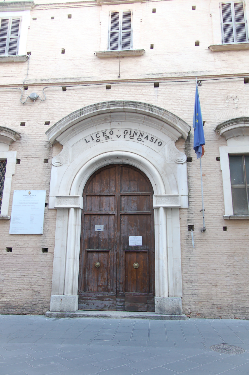 der Eingang zur ehemaligen privaten, kirchlichen "Hochschule" und heutigen Gymnasium "Giambattista Vico" in Chieti